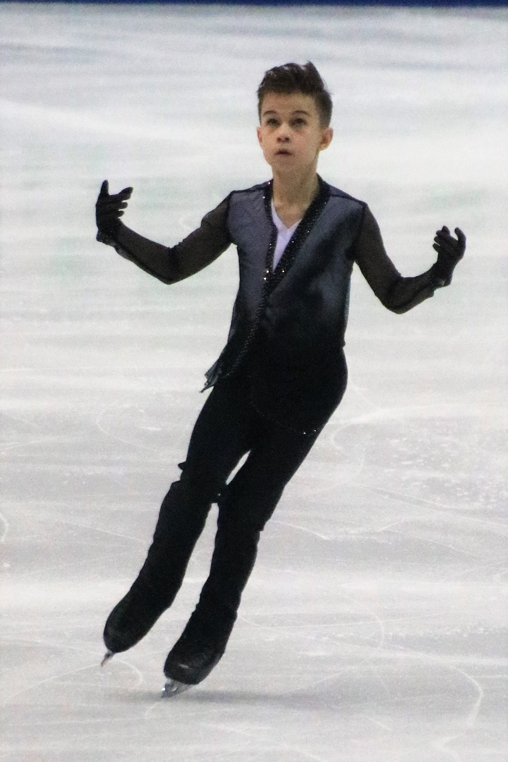 Даниил Самсонов (Россия) на финале юниорского Гран-при 2019-2020